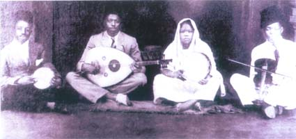 La chanteuse Sitti Bint Saad, de Zanzibar, et ses musicienns